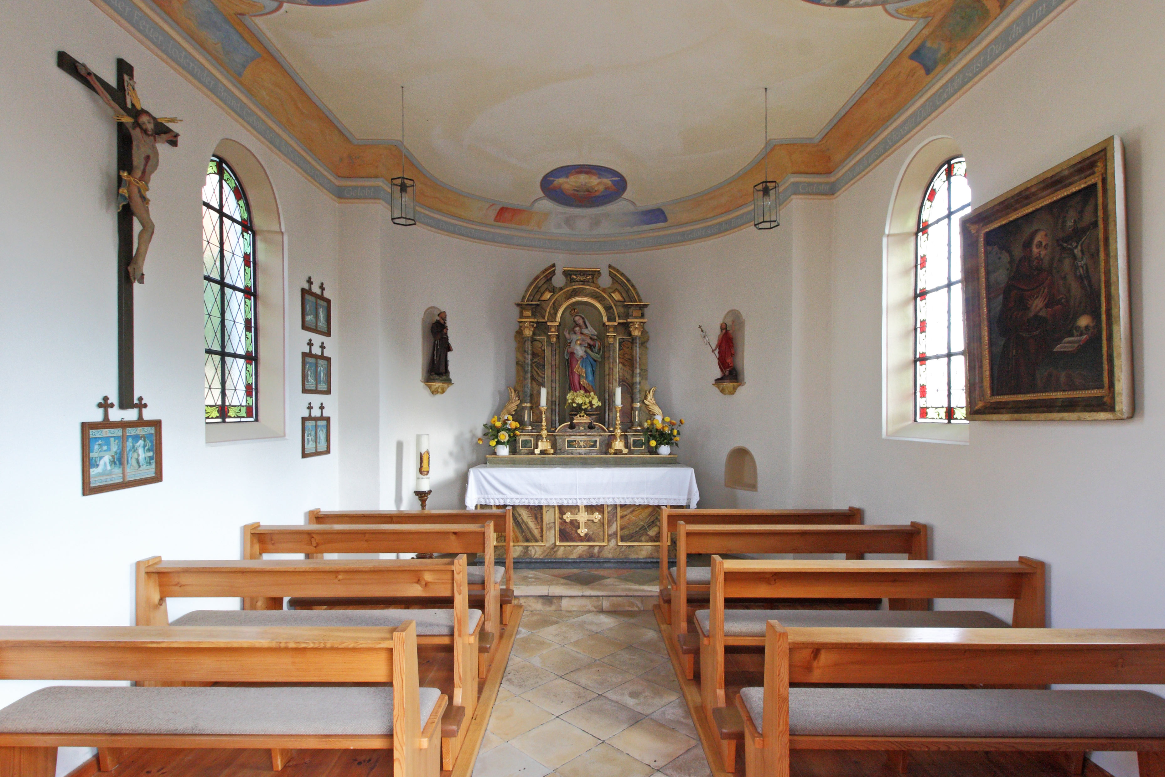 Kapelle Sankt Franziskus in Oberried, Gemeinde Breitenthal; Innenansicht